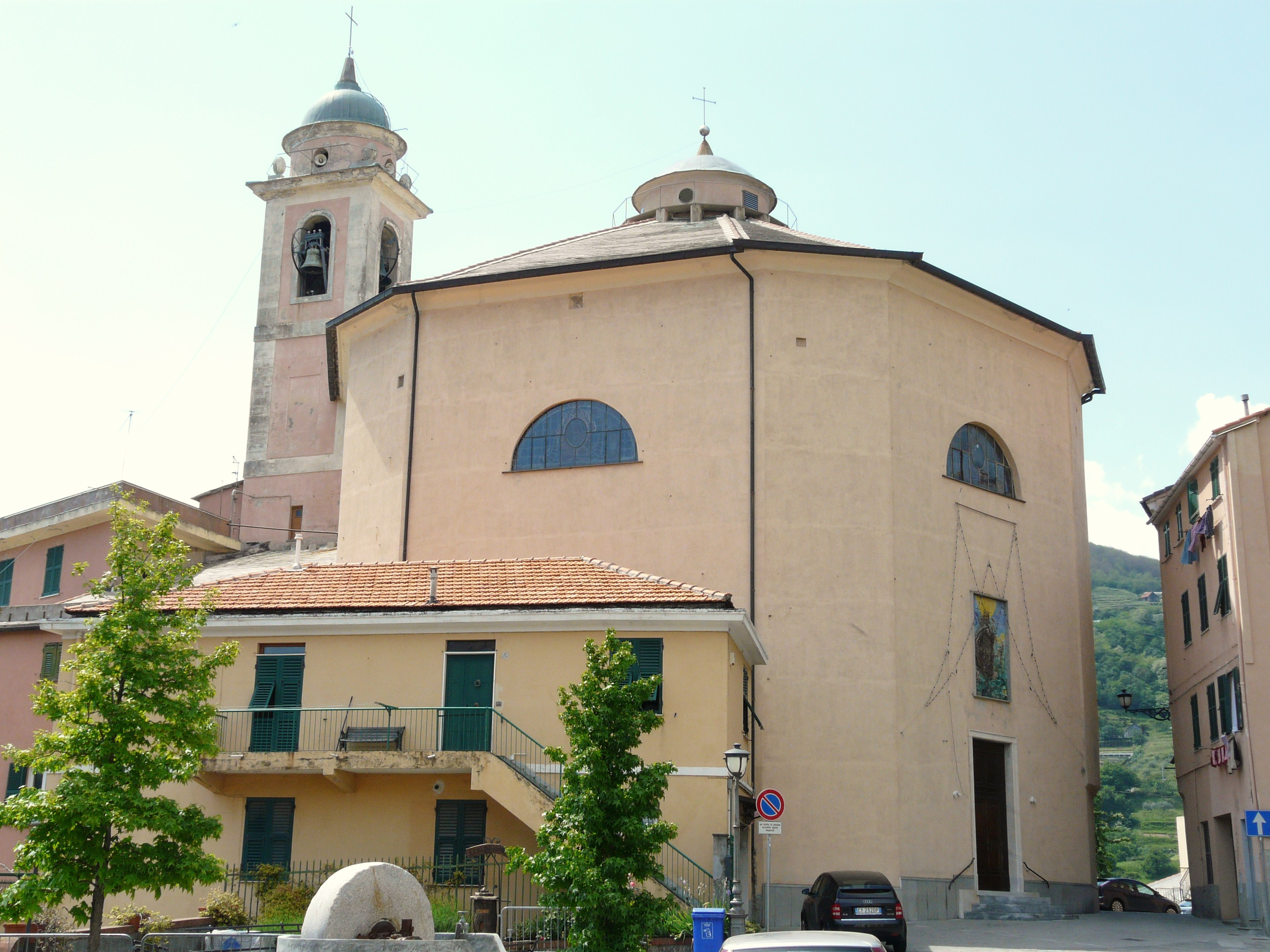 Chiesa di Sant'Antonio abate di Mele, Liguria, Italia